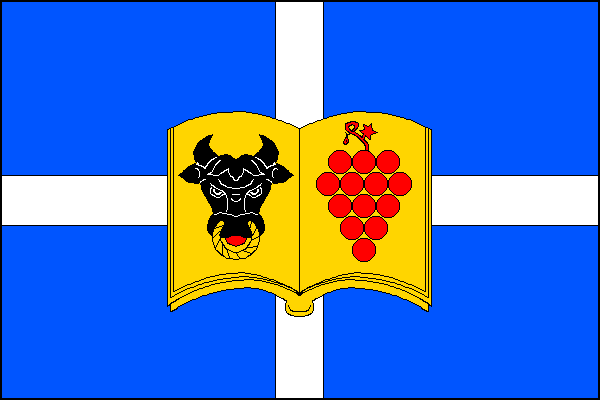 vlajka, Kadov, okres Znojmo